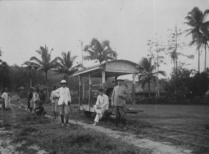 Foto. Houtvesters poseren bij een wagon, bosdistrict Zuid-Randoeblatoeng